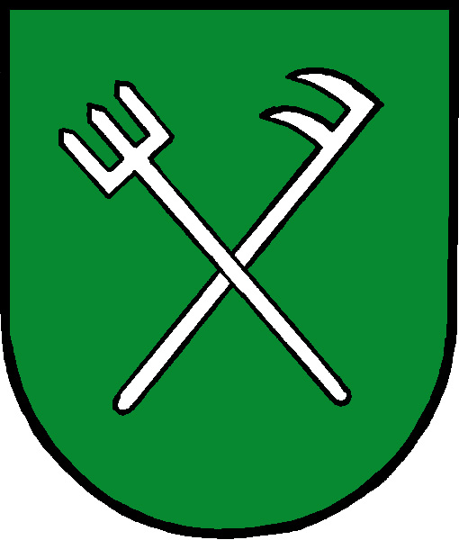 Znak obce Tvarožná